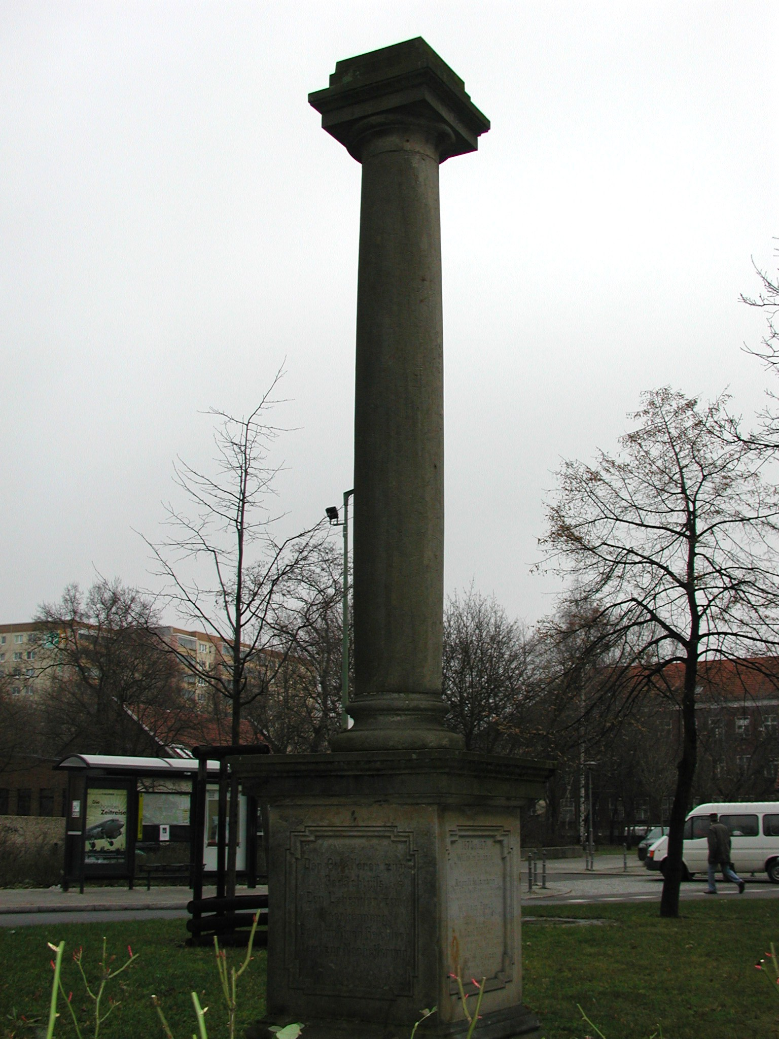 Die Preußensäule auf dem Friedrichsfelder Anger